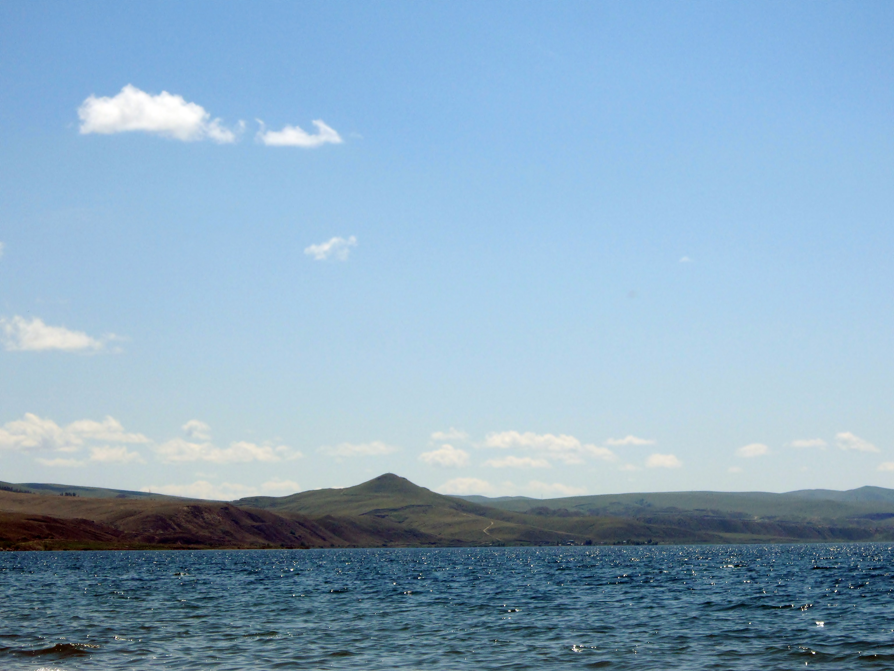 Священная сопка Баин-Зурхэ (Богатое Сердце), с находящимся на вершине обоо, над Гусиным озером.